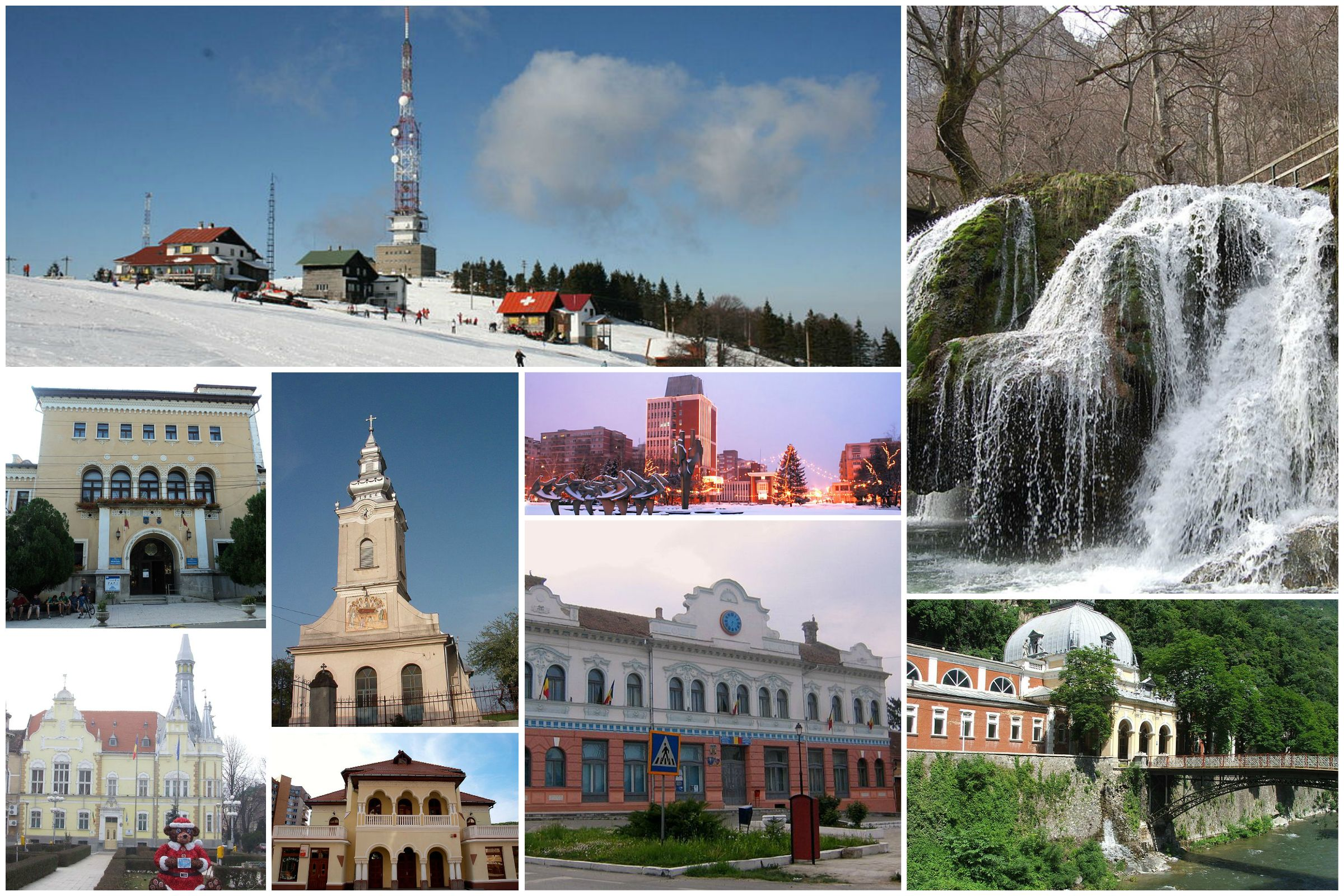 colaj judeţul Caraş Severin